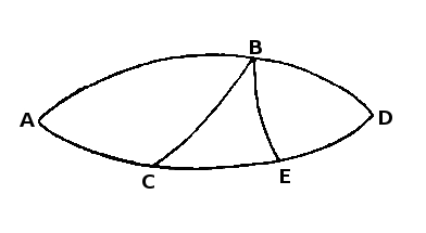 Figura explicativa de la proposició 10 del primer llibre de les Esfèriques de Menelau